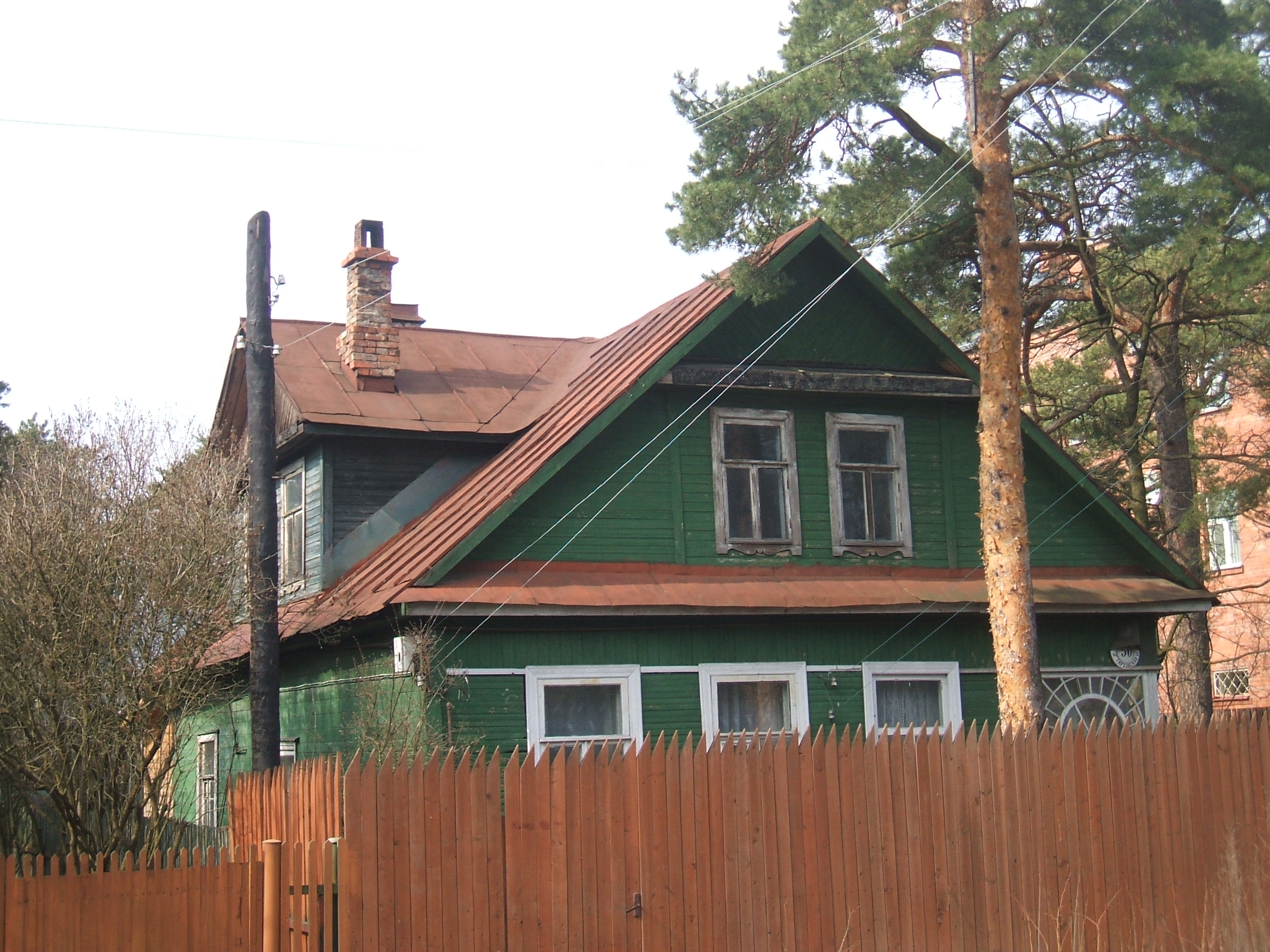 Sestroretsk